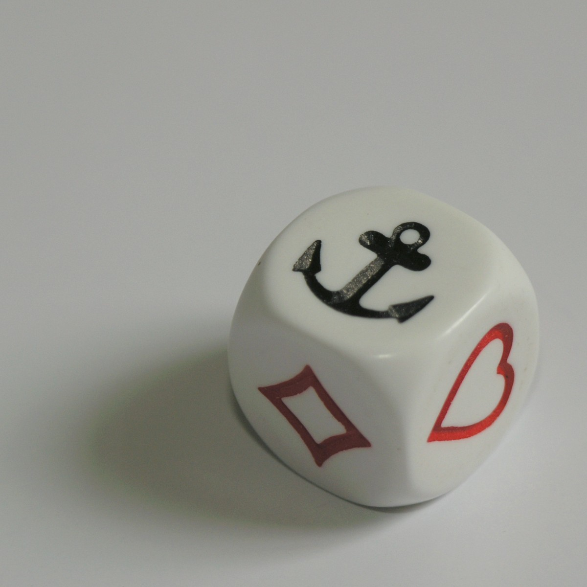 Kostka šestistěnná - námořnická loterie